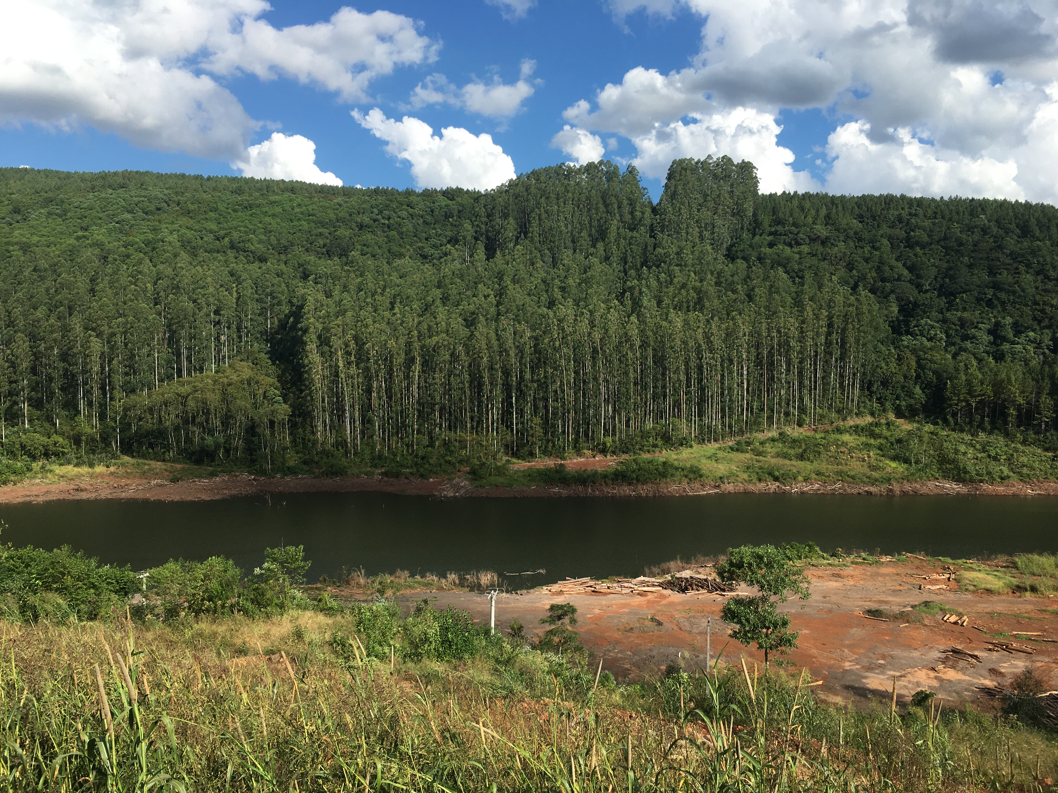 Rio Irani